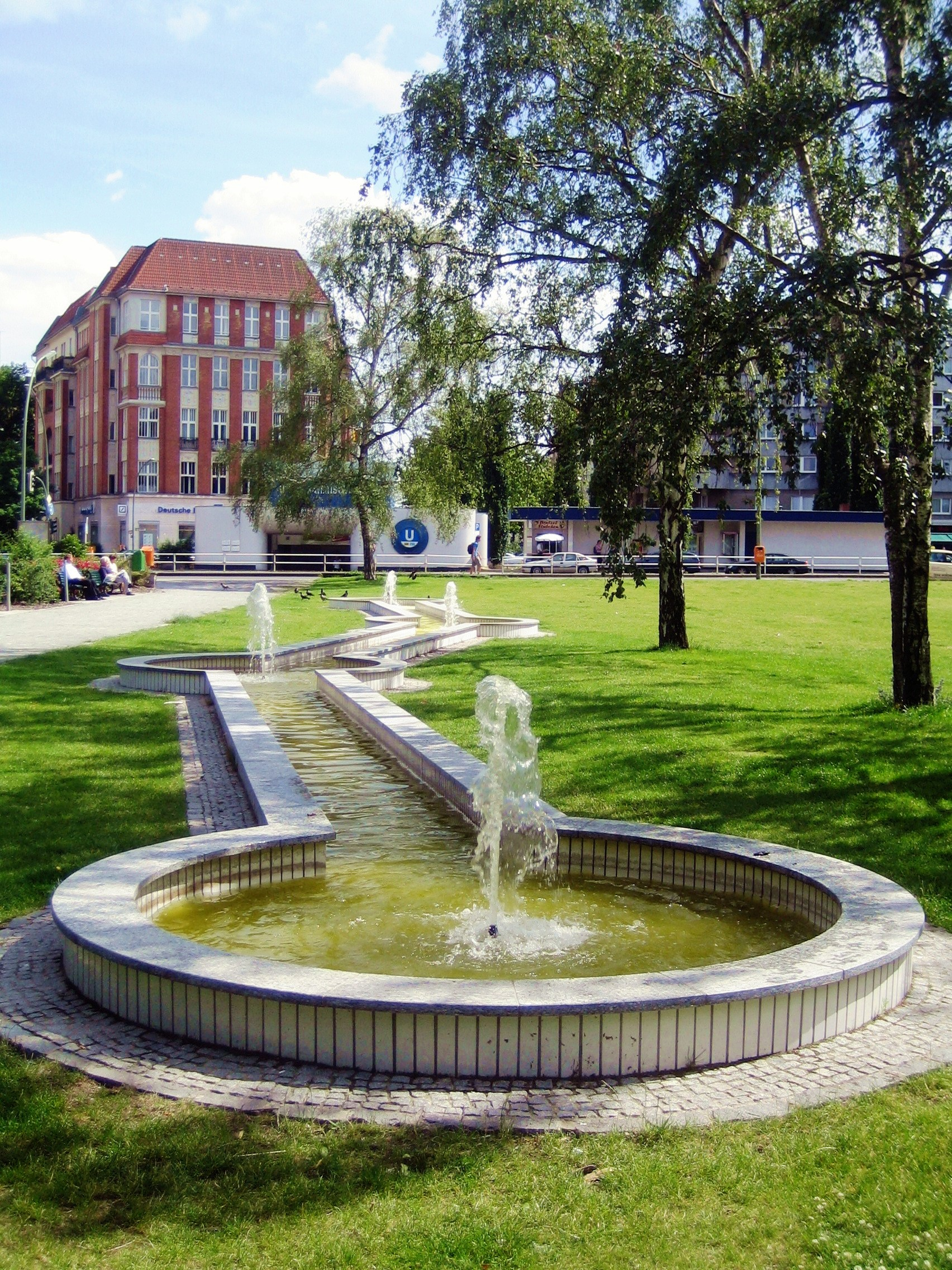 Berlin-Schöneberg, Bayerischer Platz. Grün- und Brunnenanlage. Im Hintergrund der U-Bahnhof Bayerischer Platz.